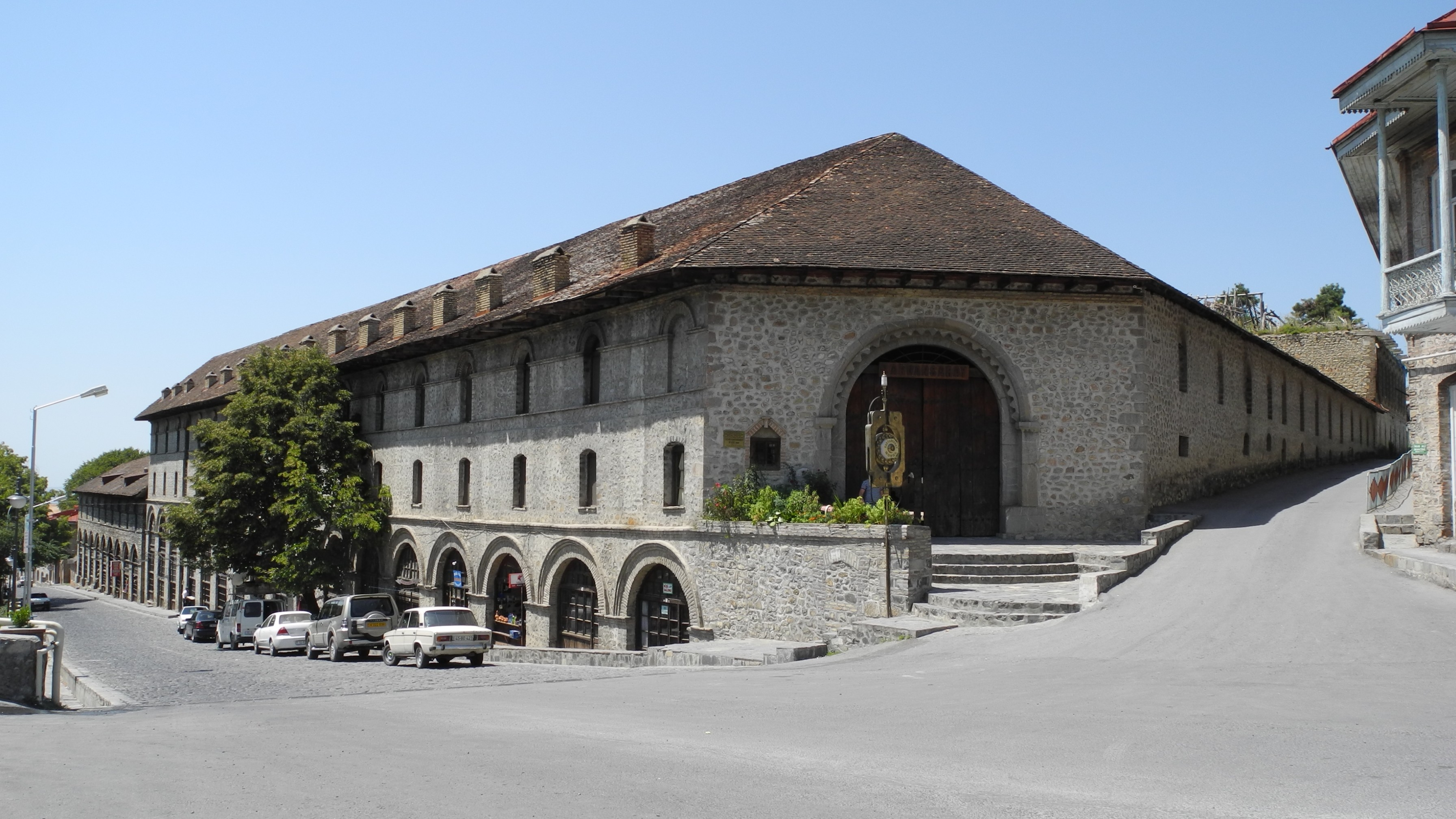 Sheki-Kish,Karavanserei, Strassenseite